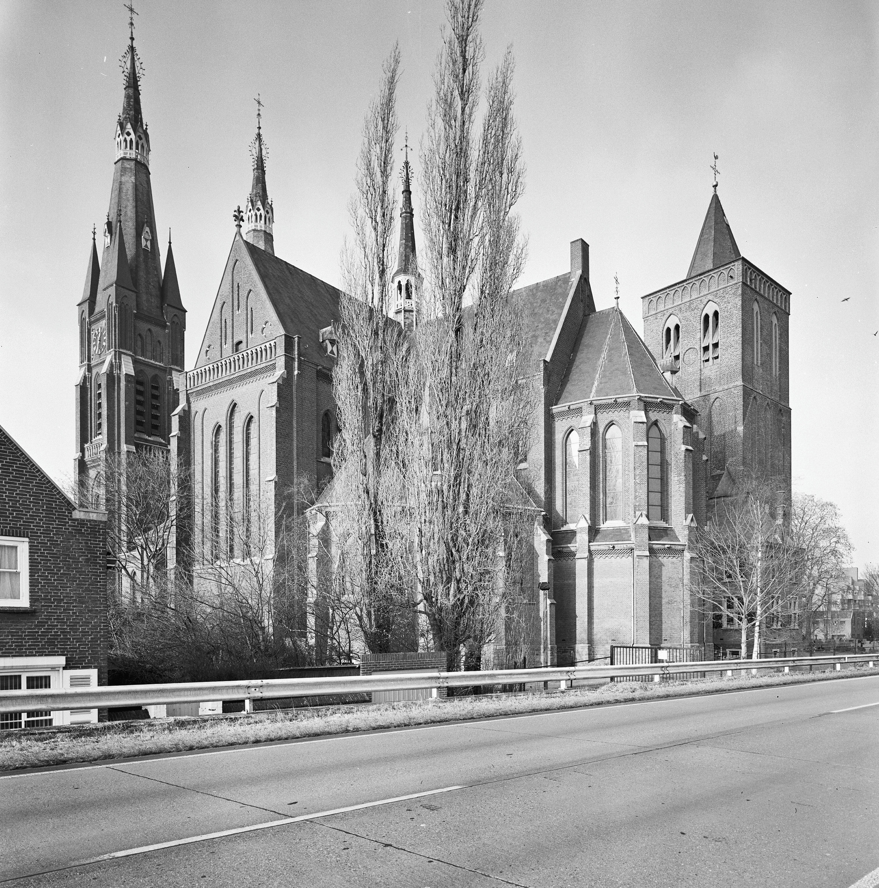 Sint Martinuskerk: Overzicht zuidoostgevel met de oude kerktoren (opmerking: Gefotografeerd voor Monumenten In Nederland Noord-Brabant, bladzijde 126)